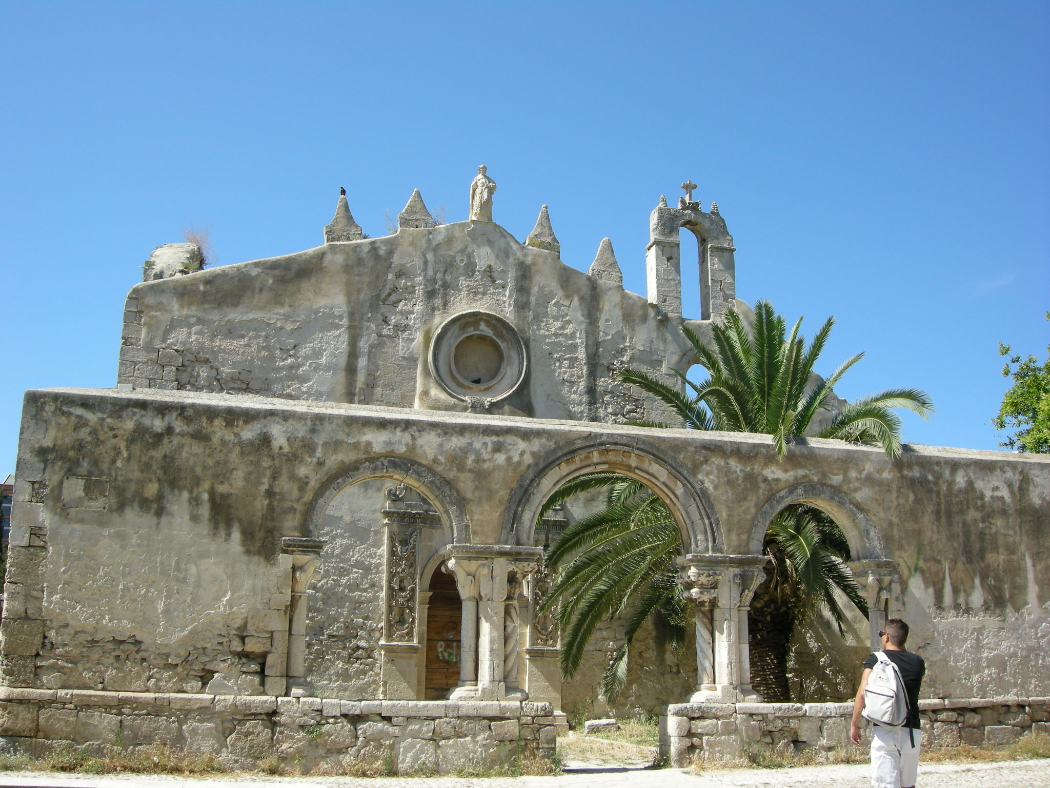 Siracusa, neapolis, chiesa di san giovanni